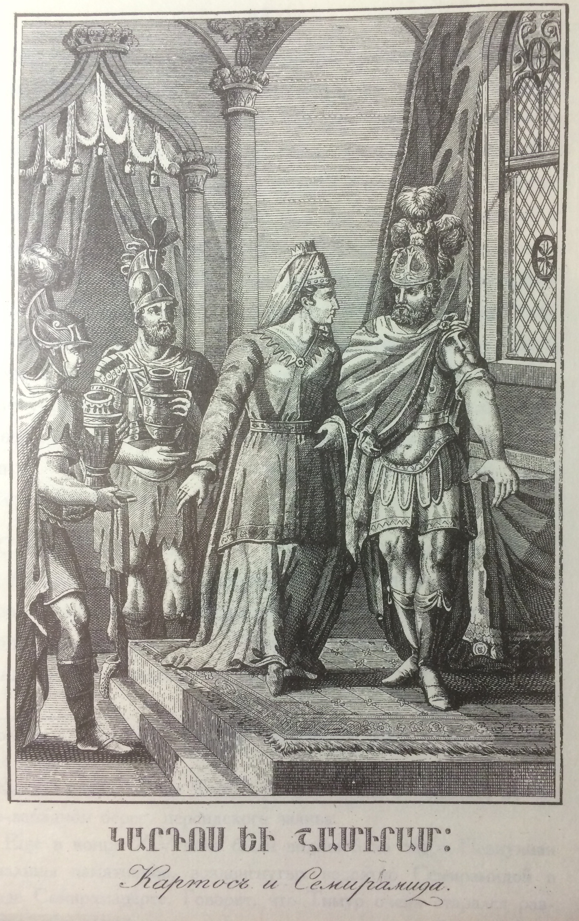 Արա Գեղեցիկի որդի Կարդոսը և Շամիրամը